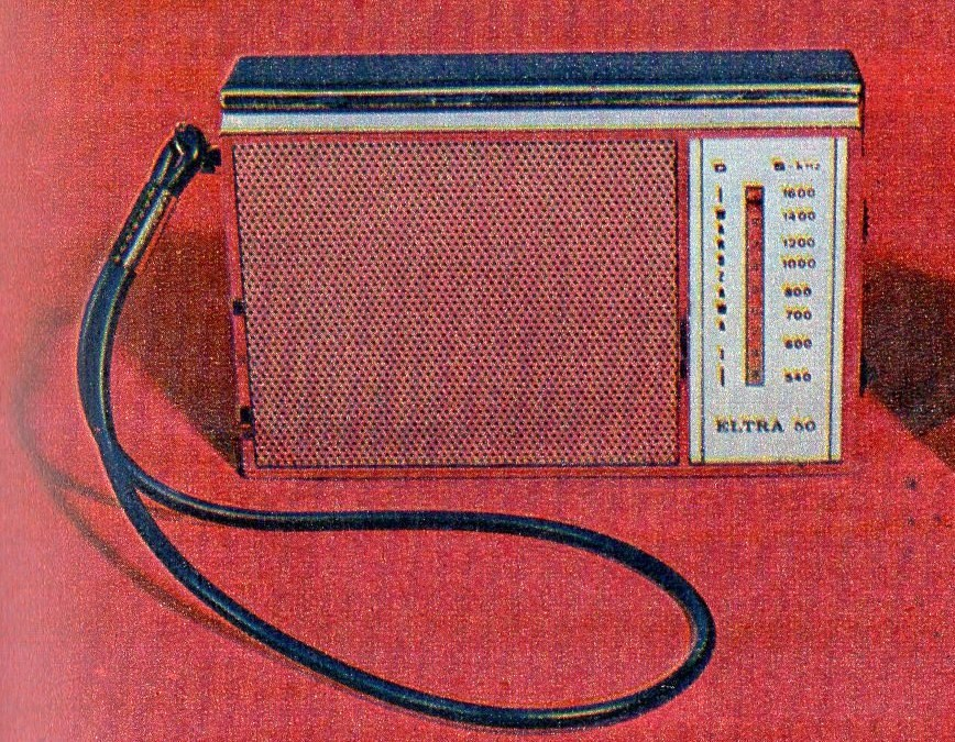 Radio Eltra 50 z 1973r.